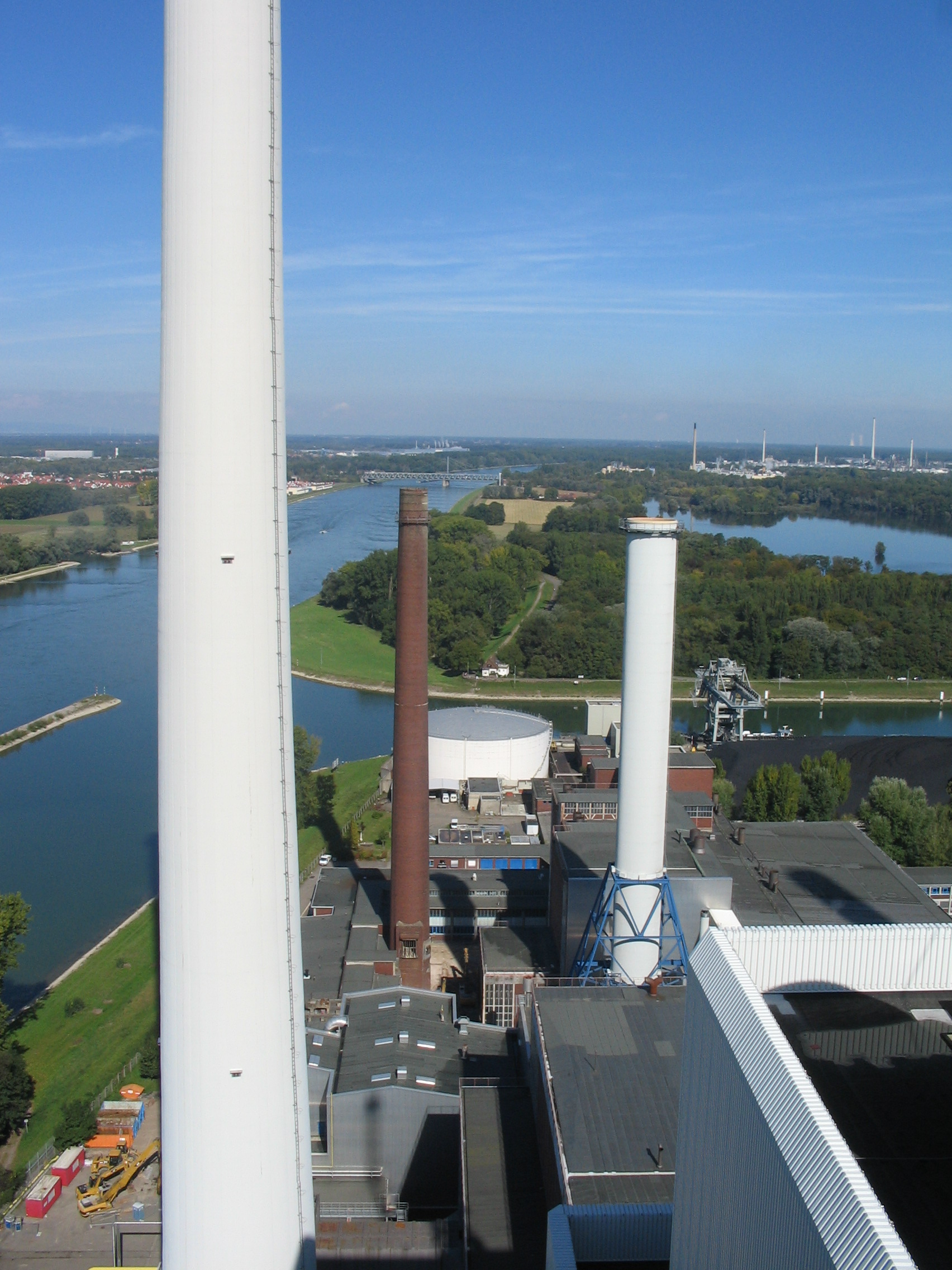 Rheinhafen-Dampfkraftwerk Karlsruhe